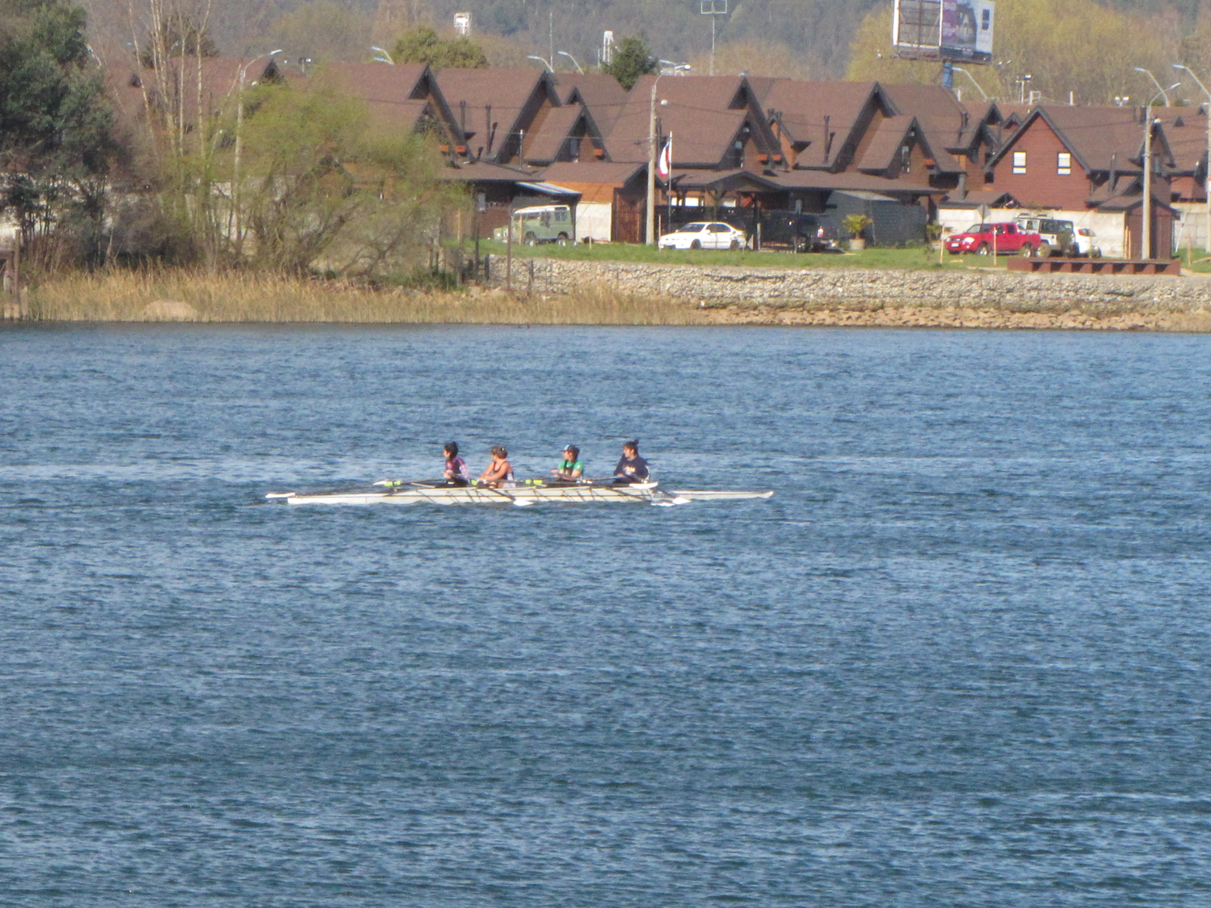 Entrenamiento de remo contra la corriente en el río Callecalle, Valdivia, Chile.